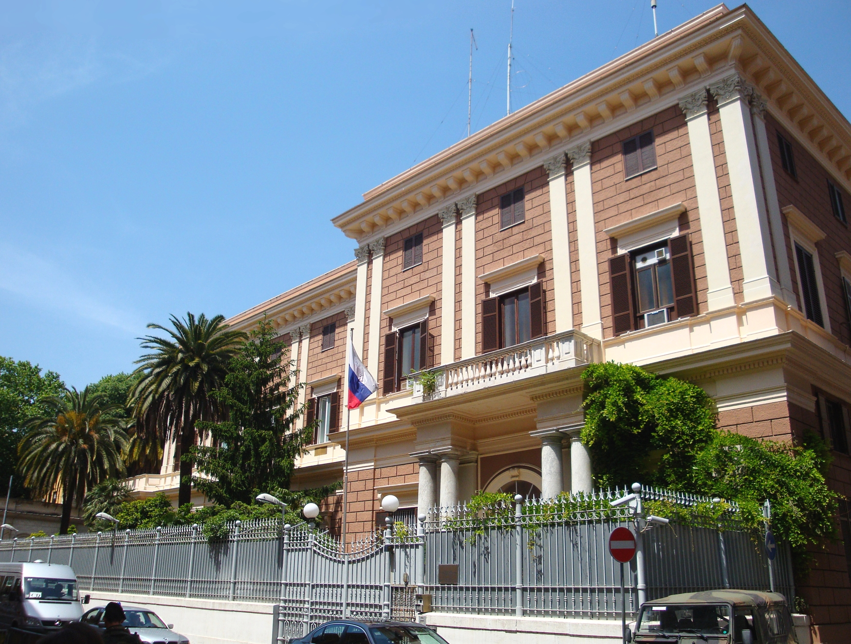 Здание Посольства РФ в Италии